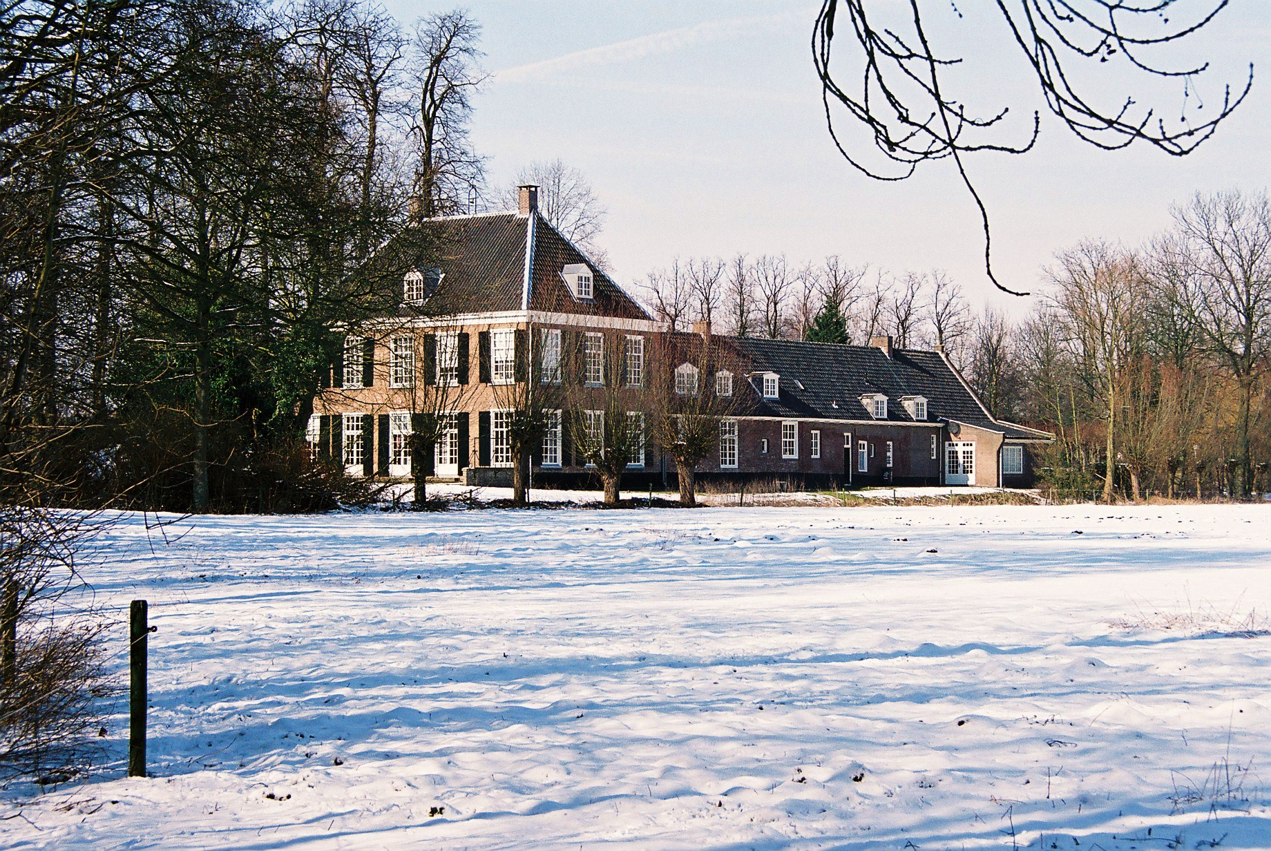 Huize Muyserick te Vught.